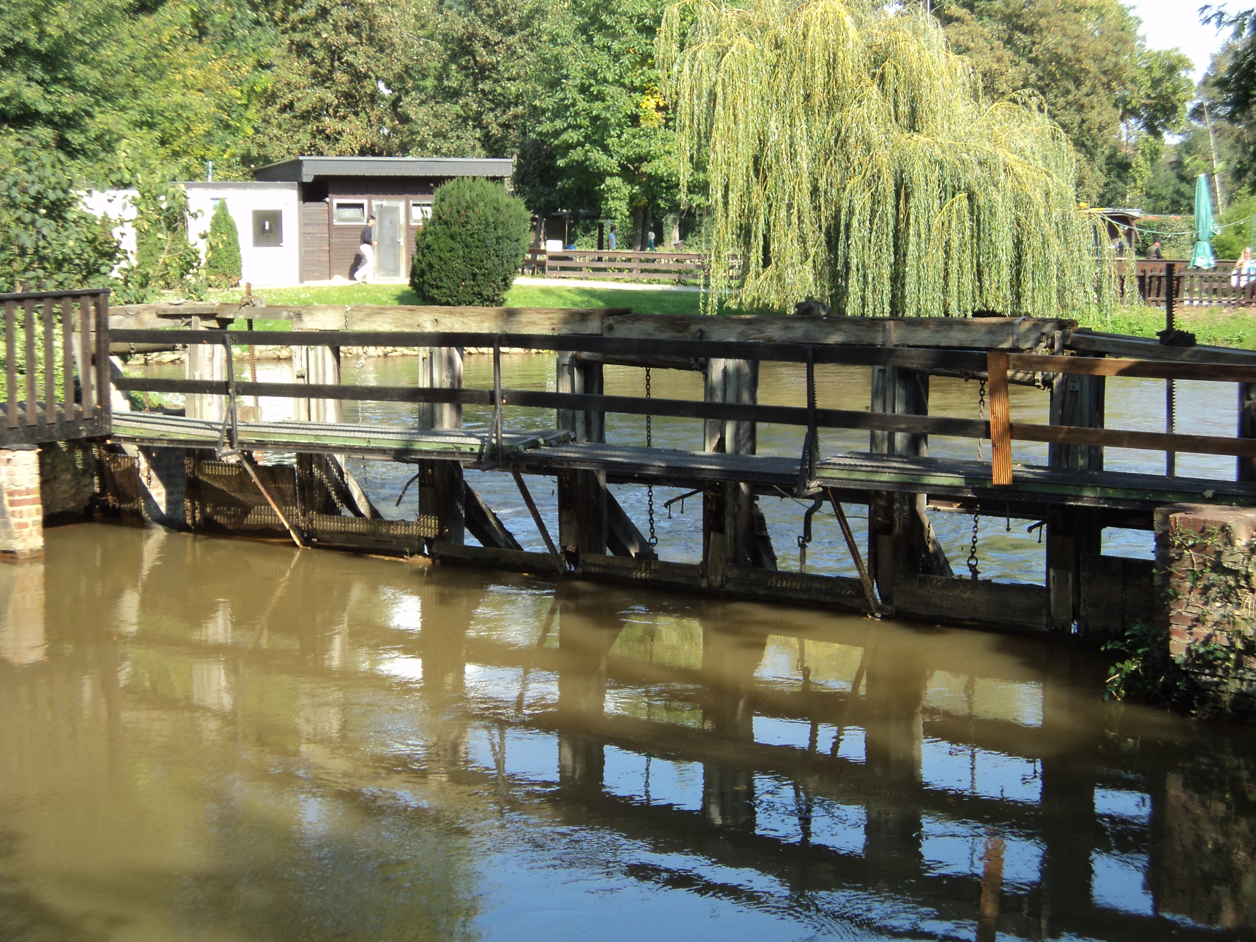 Blick Richtung Angelpark 50126 Bergheim-Zieverich